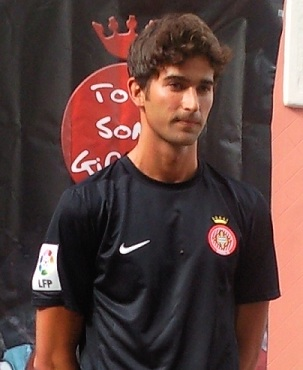 Marcos tebar 11/07/2011